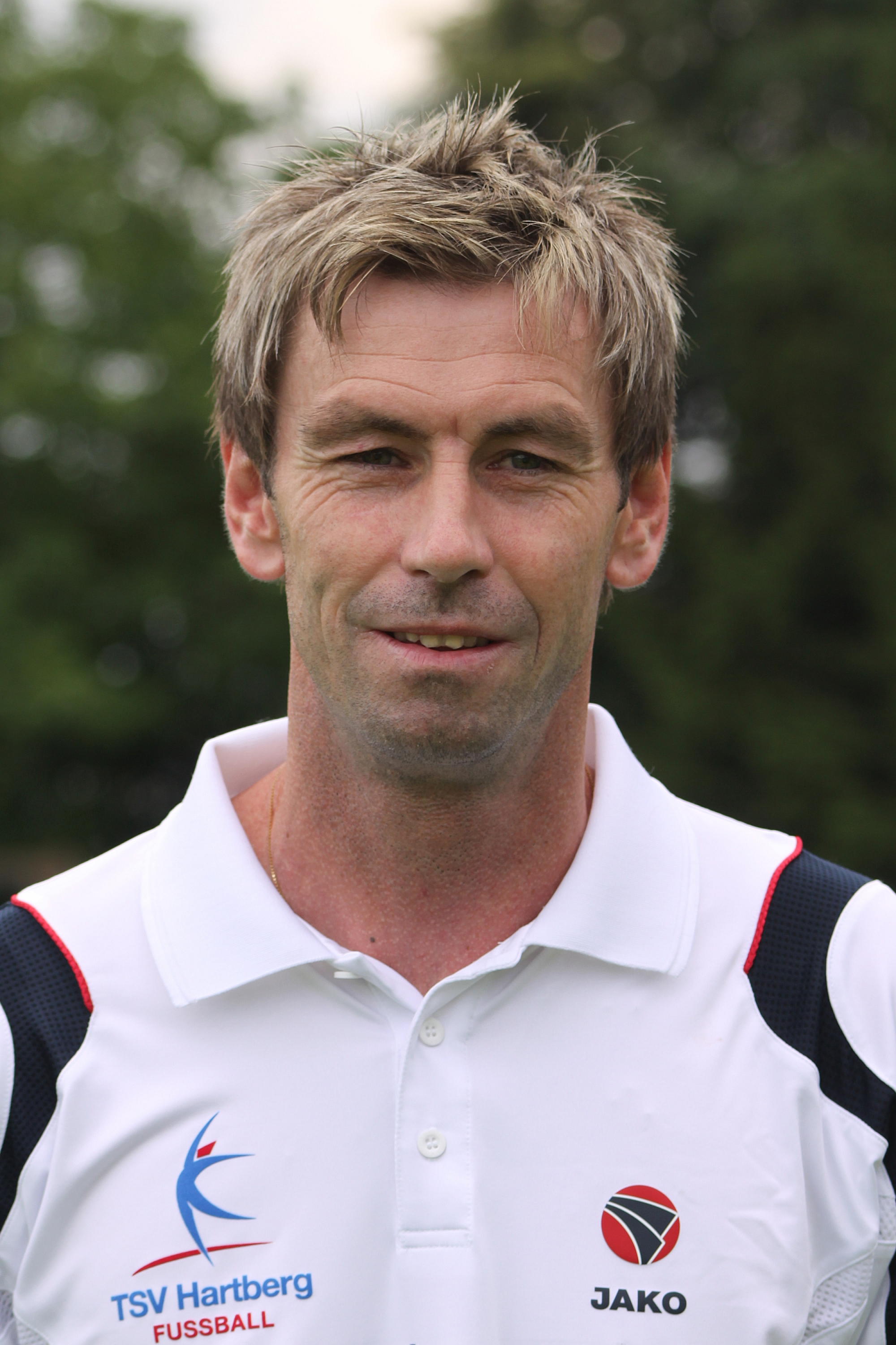 Bruno Friesenbichler, Fußballtrainer - TSV Hartberg (1)